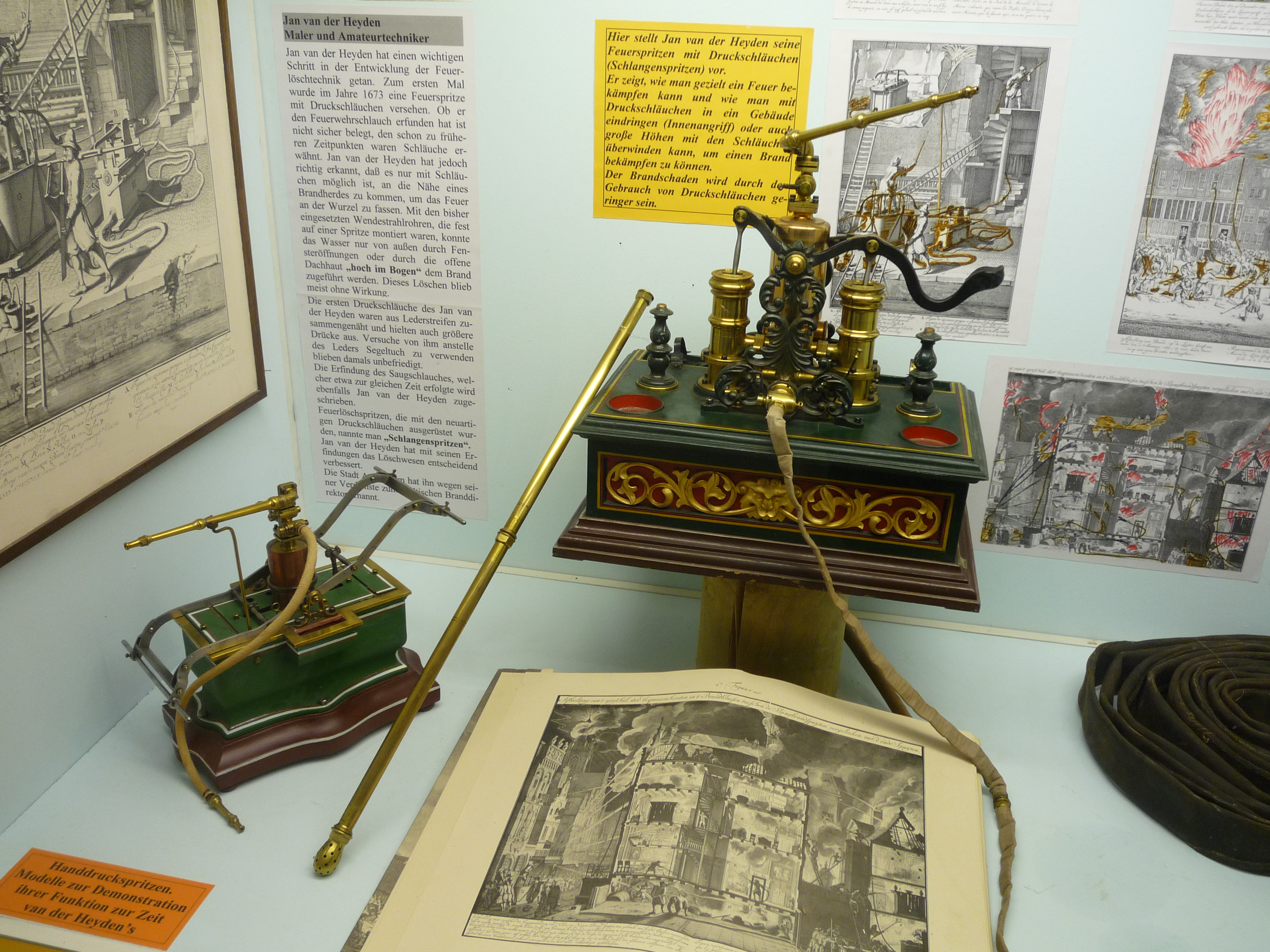 Modelle von Handdruckspritzen aus der Zeit von Jan van der Heyden im Feuerwehrmuseum Salem am Bodensee